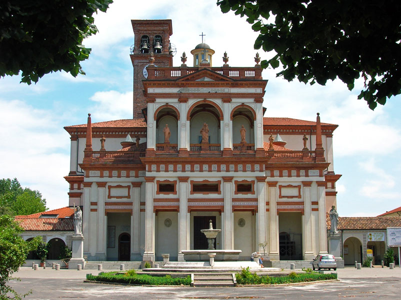 Santuario della Madonna della Bozzola a Garlasco (PV), frazione Bozzola